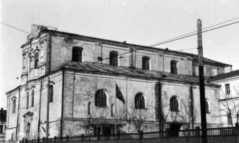 Erlöser Verklärungs-Kirche, Panzerstraße 15 Minsk, März 1943 Film 69/33 Foto: Dr. Nerling